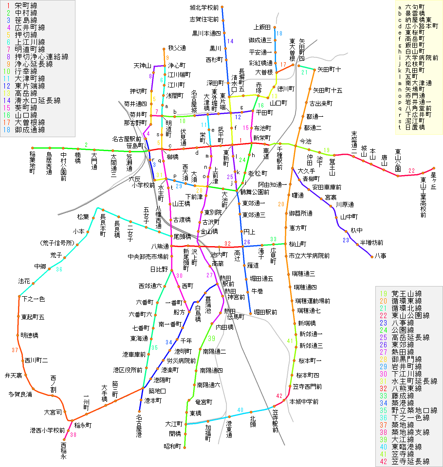 1961年12月1日時点の名古屋市電の路線図。濃い灰色の線は国鉄線、薄い灰色の線は私鉄線（名鉄線・近鉄線）を示し、その他の色の線は名古屋市電の各路線を示す。